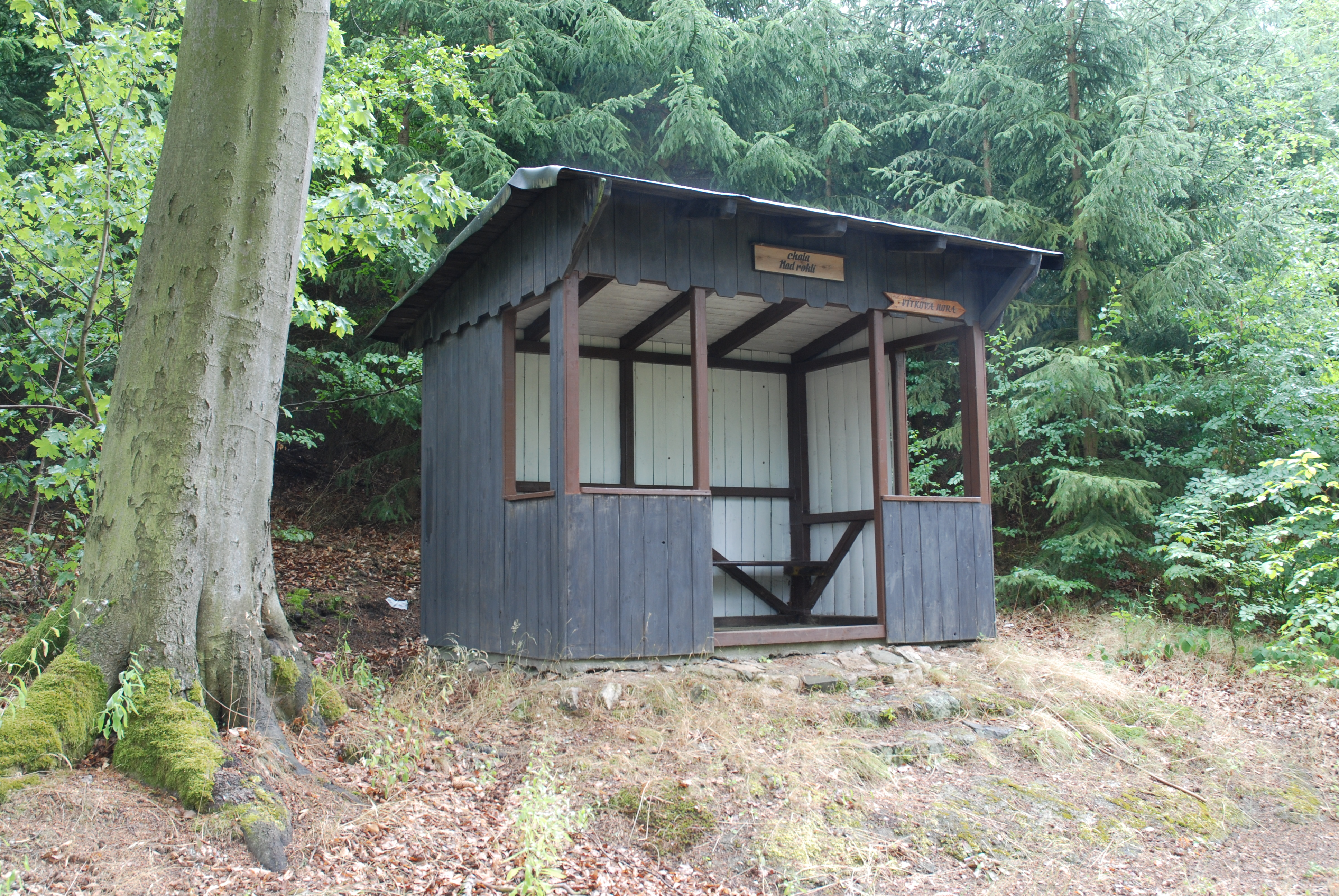 Chata Nad Roklí v karlovarských lázeňských lesích u Beethovenovy cesty